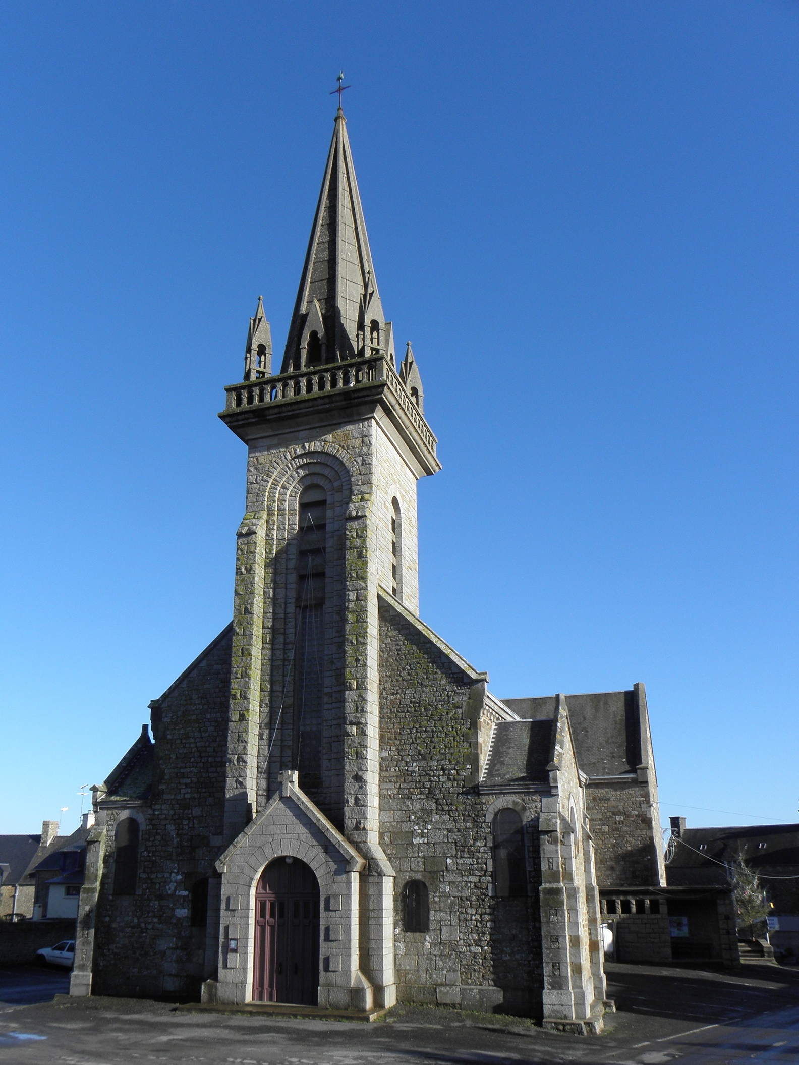 Église Saint-Martin-de-Tours de Roz-sur-Couesnon (35). Façade occidentale.